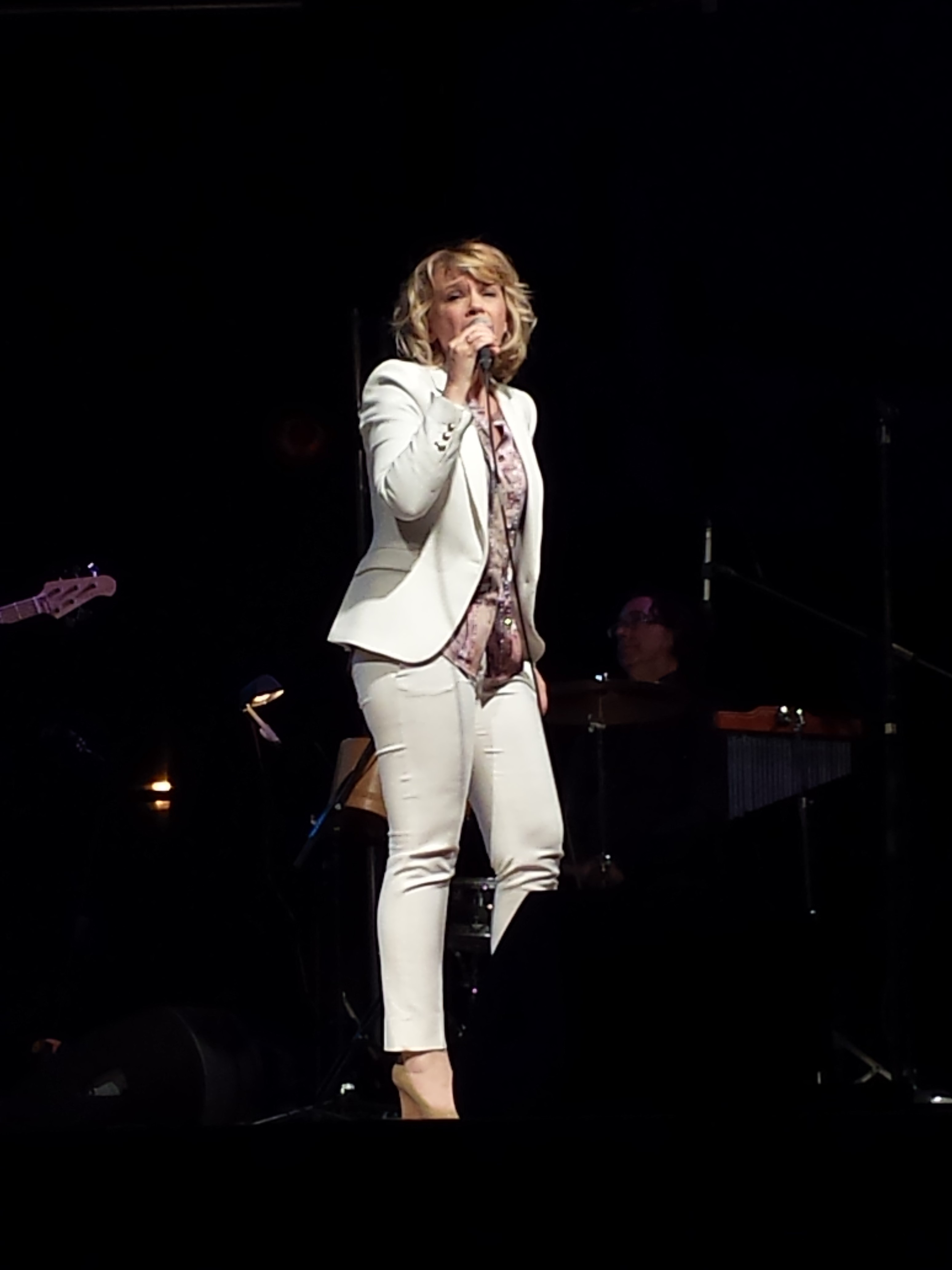 En spectacle en plein-air le 16 juillet 2015 à Québec (Québec, Canada) au parc de la Commune de l'arrondissement de Charlesbourg